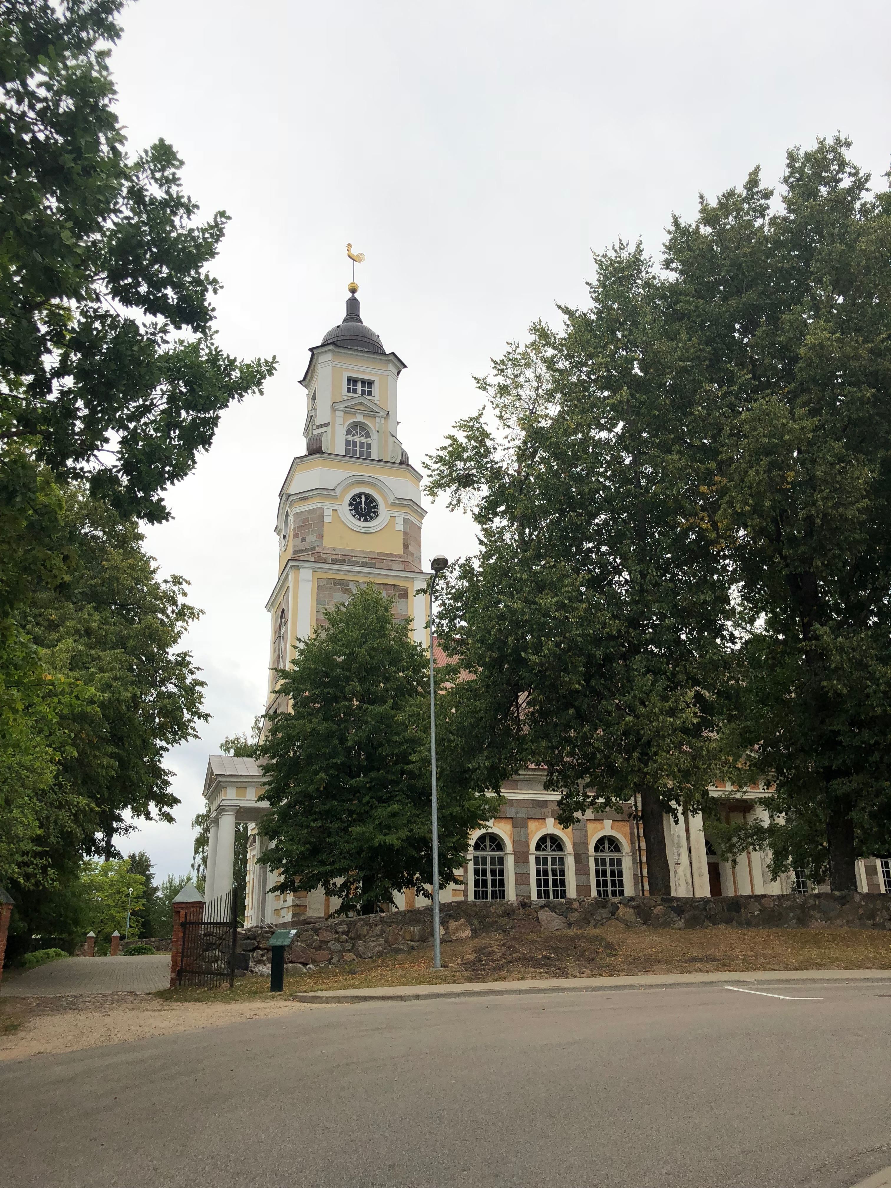 Алуксне